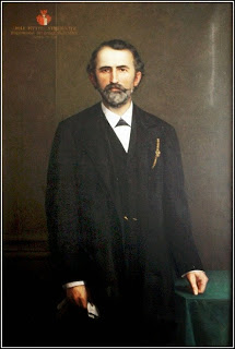 portrét - Adolf Streer rytíř von Streeruwitz